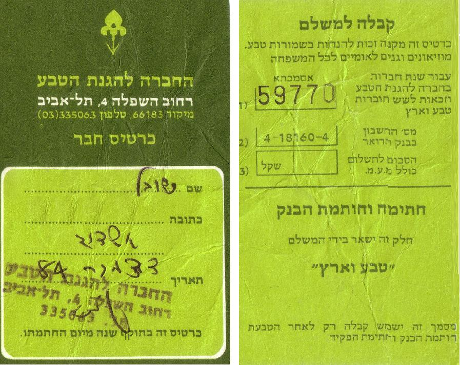 החברה להגנת הטבע, תעודת חבר, לפני עידן כרטיסי הפלסטיק